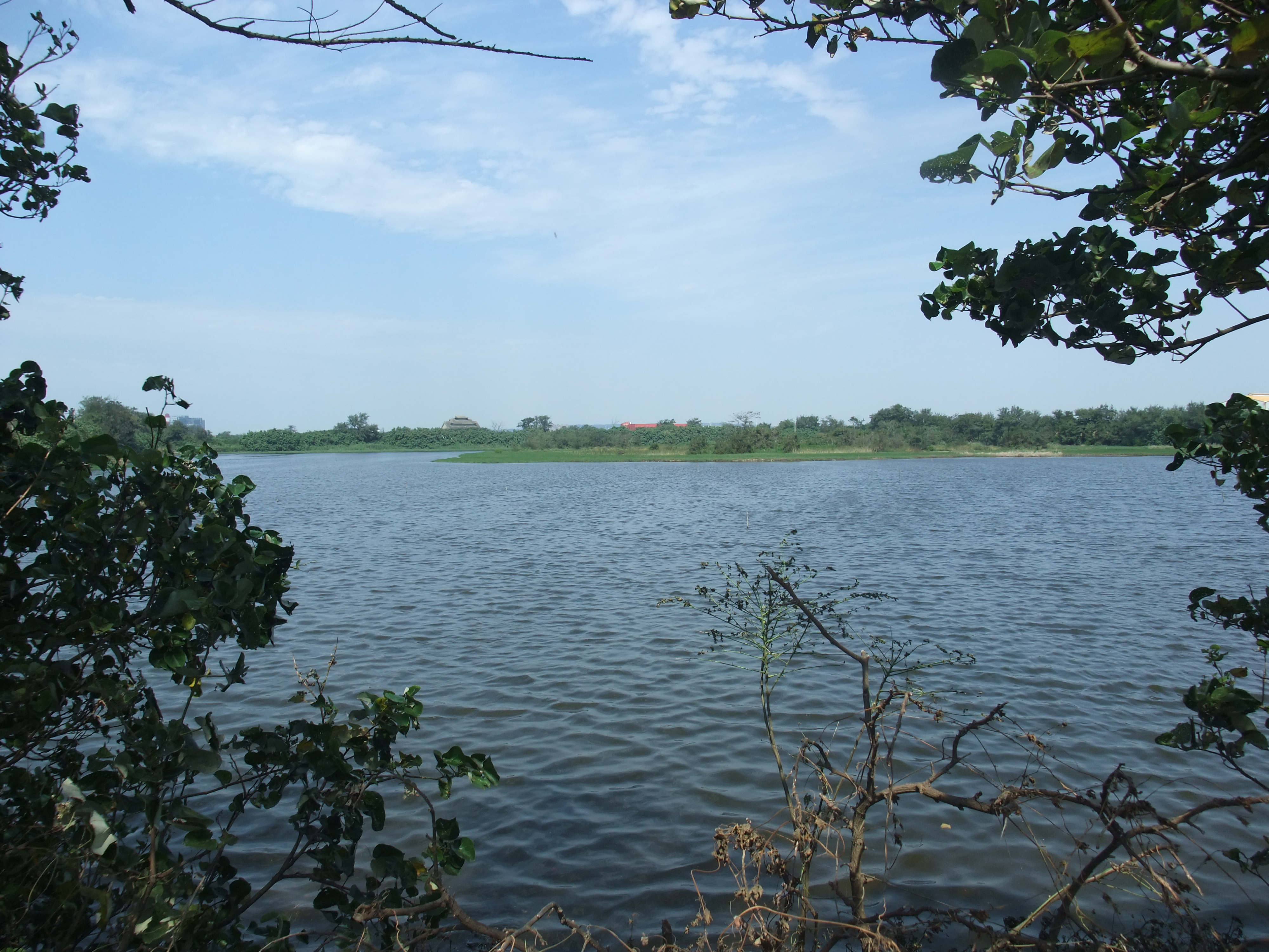 金城湖一景